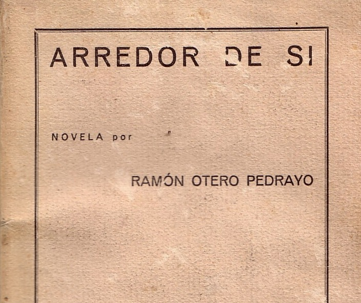 Detalle da portada de Arredor de si